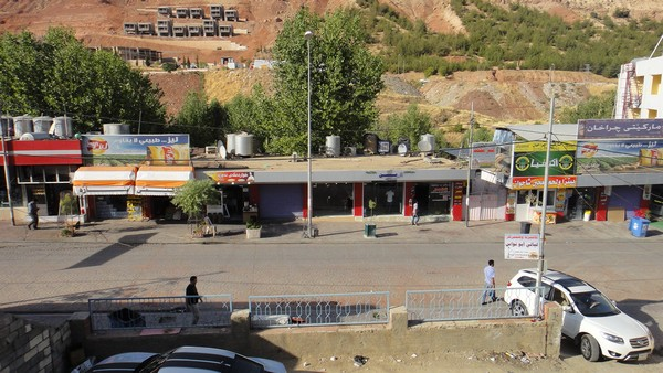 لقطة للشارع الرئيسي في شقلاوة